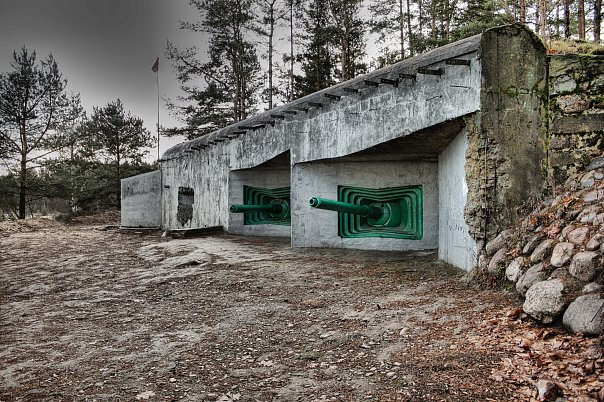 Артиллерийский полукапонир АПК-1, находящийся на территории выставочного комплекса "Сестрорецкий рубеж".